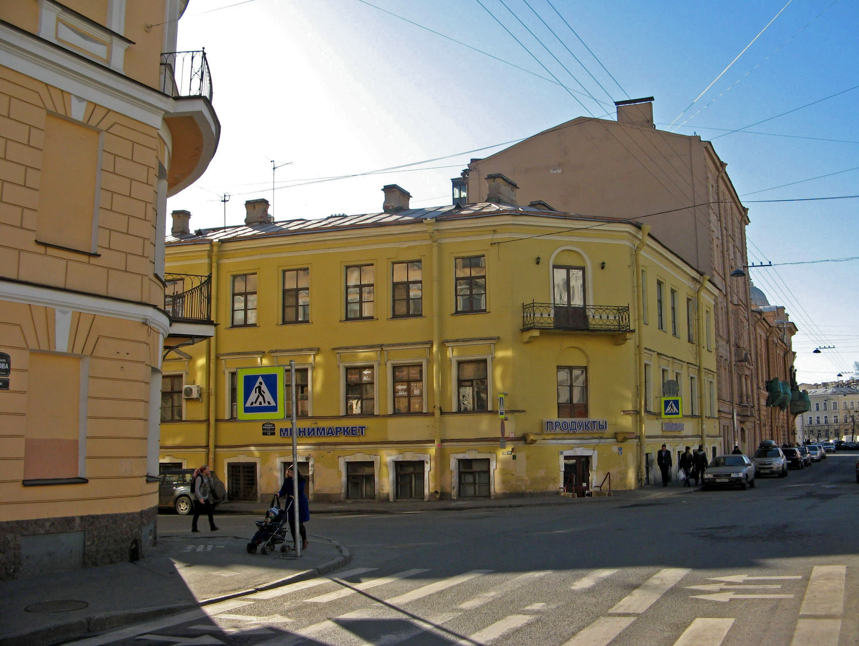 Дом купца Злобина (Санкт-Петербург, канала Грибоедова наб., 84, Большая Подъячевская ул., 1)